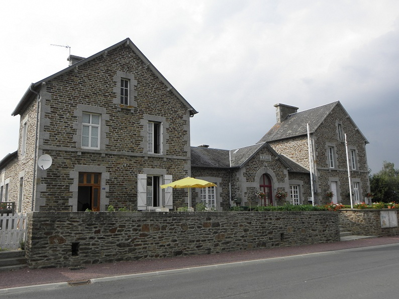 Mairie d'Argouges (50).